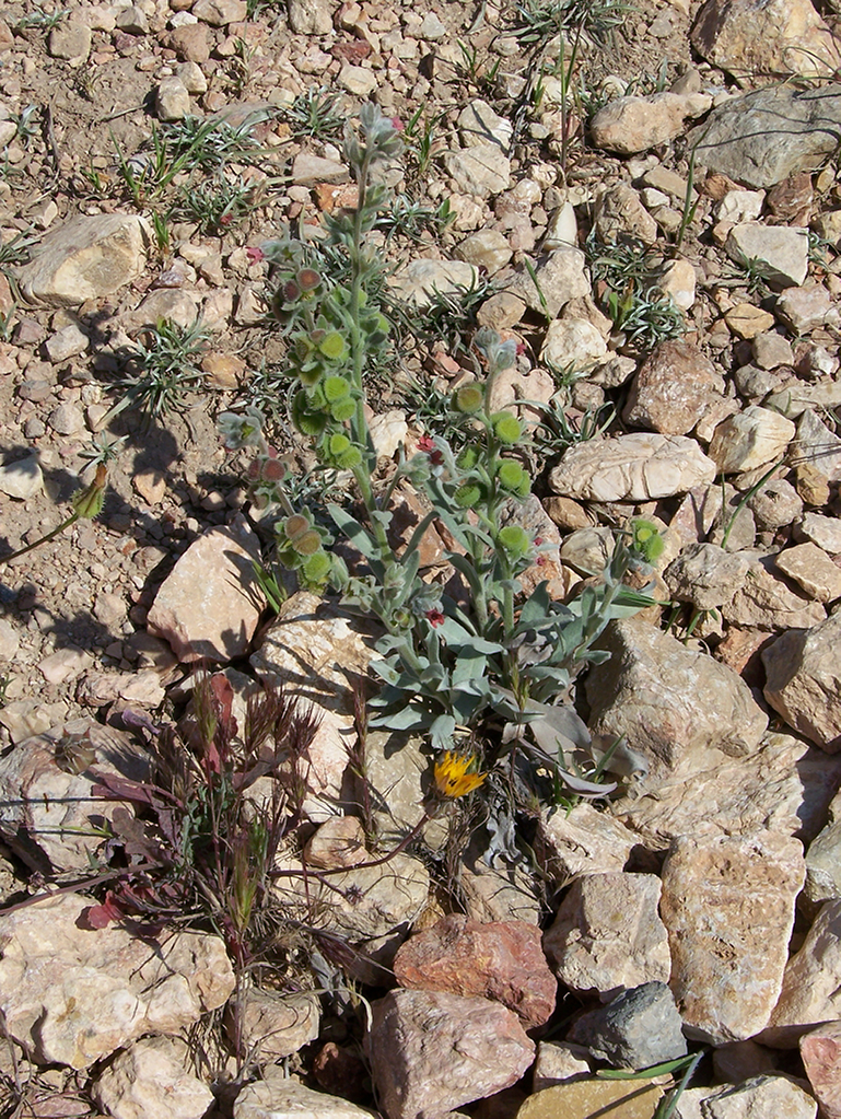 Pardoglossum cheirifolium (VIniebla) - Vista general en floración y fructificación; con, al lado Reichardia tingitana. - Cabezo de los Ojales/de las Fuentes, Albatera (Alicante, España).